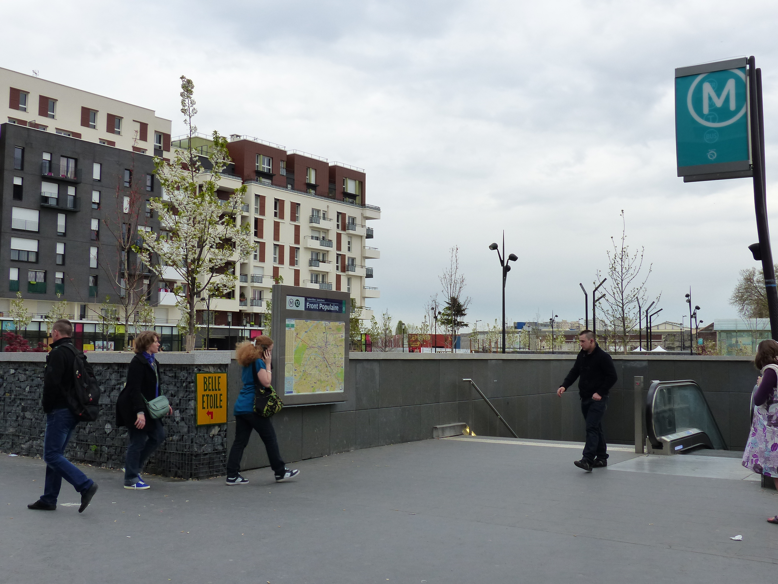 Entrée de la station de métro Front-Populaire (Saint-Denis / Aubervilliers